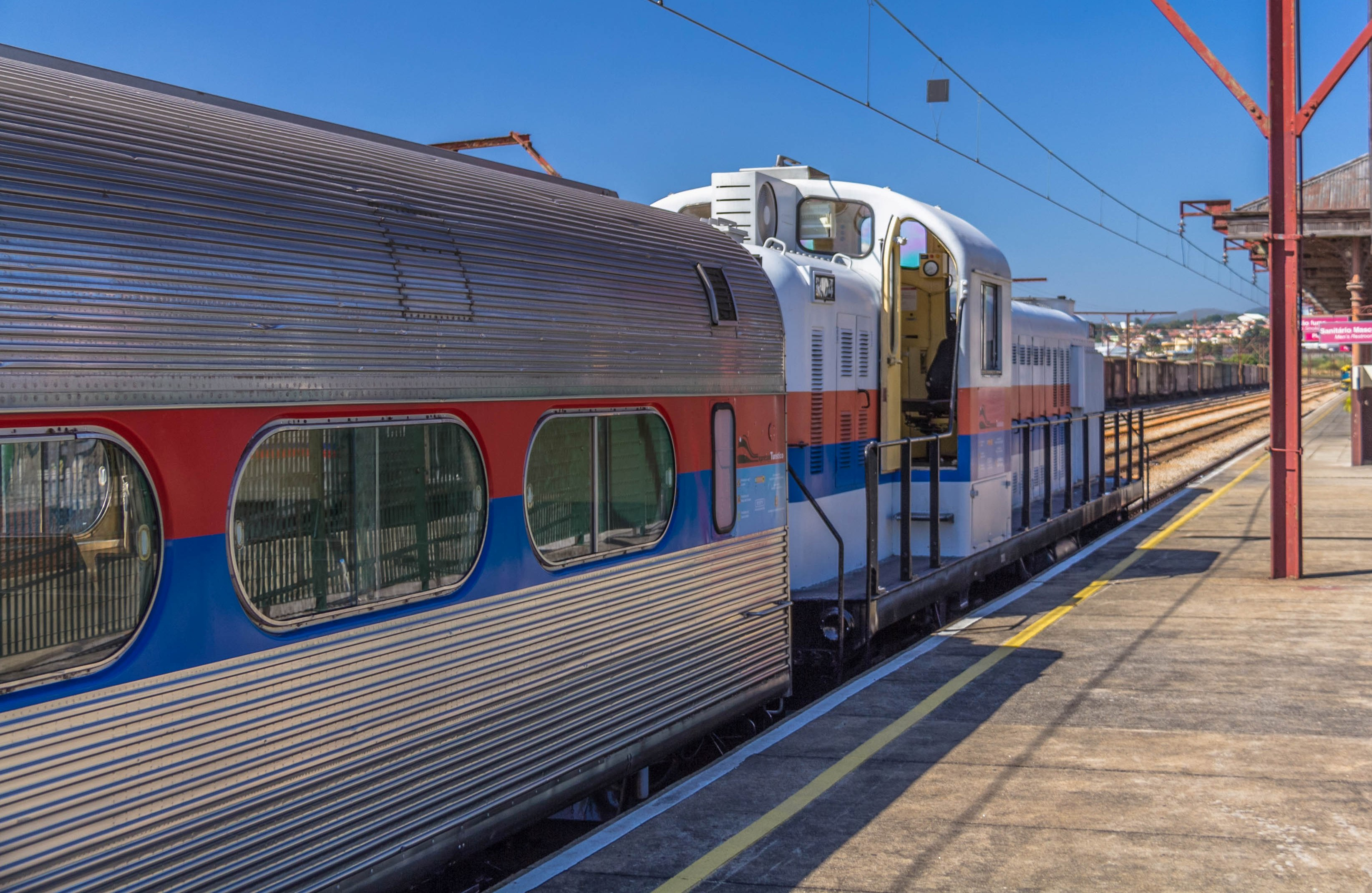 Estaço ferroviária de Jundiai e expresso turístico da CPTM